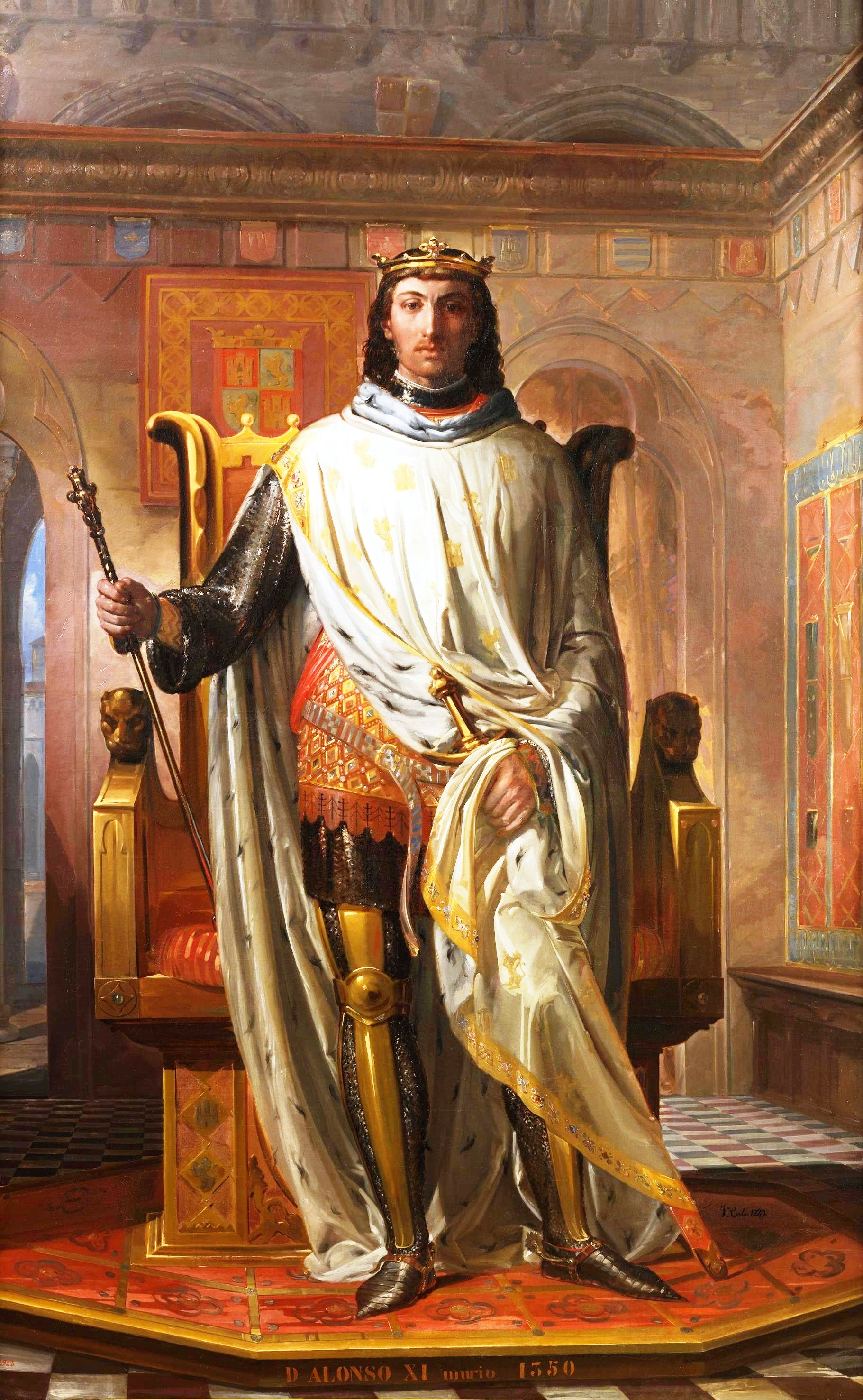 Retrato imaginario del rey Alfonso XI de Castilla (1311-1350). Fue hijo del rey Fernando IV de Castilla y de la reina Constanza de Portugal. En 1340 derrotó a los musulmanes en la batalla del Salado y en 1341 conquistó Alcalá la Real, Priego de Córdoba, Carcabuey y Rute. En 1344, tras un asedio de dos años, conquistó la ciudad de Algeciras. Alfonso XI falleció en 1350, victima de la Peste negra, mientras asediaba Gibraltar y fue sucedido en el trono por su hijo, Pedro I de Castilla.